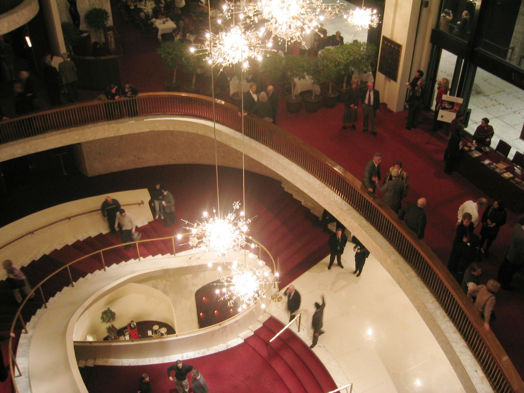 Metropolitan Opera (Lincoln Center), staircase